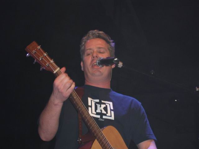 Thomas Acda tijdens een concert in Vredenburg, Utrecht.